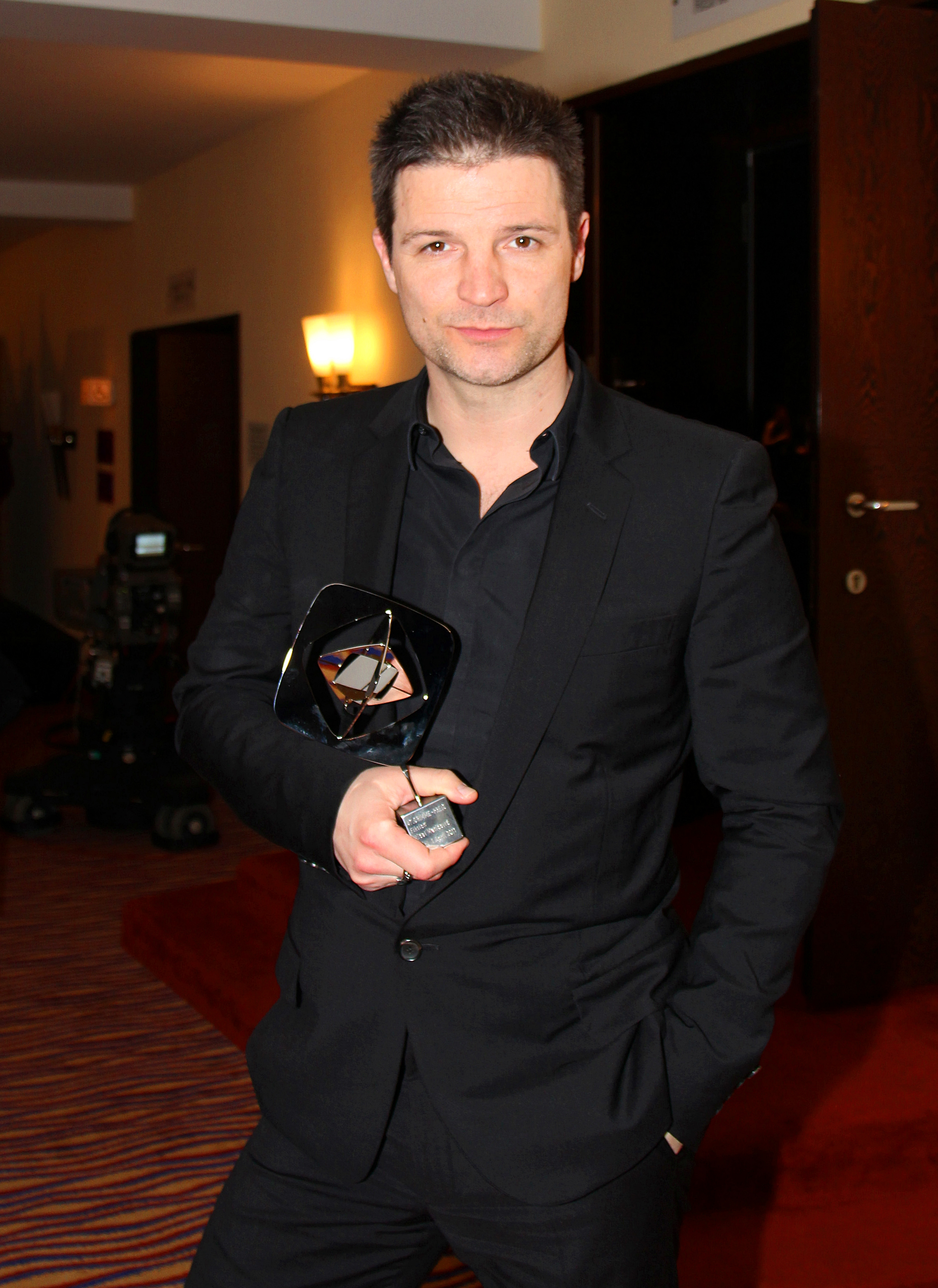 Grimme-Preisträger Mišel Matičević bei der Verleihung 2011